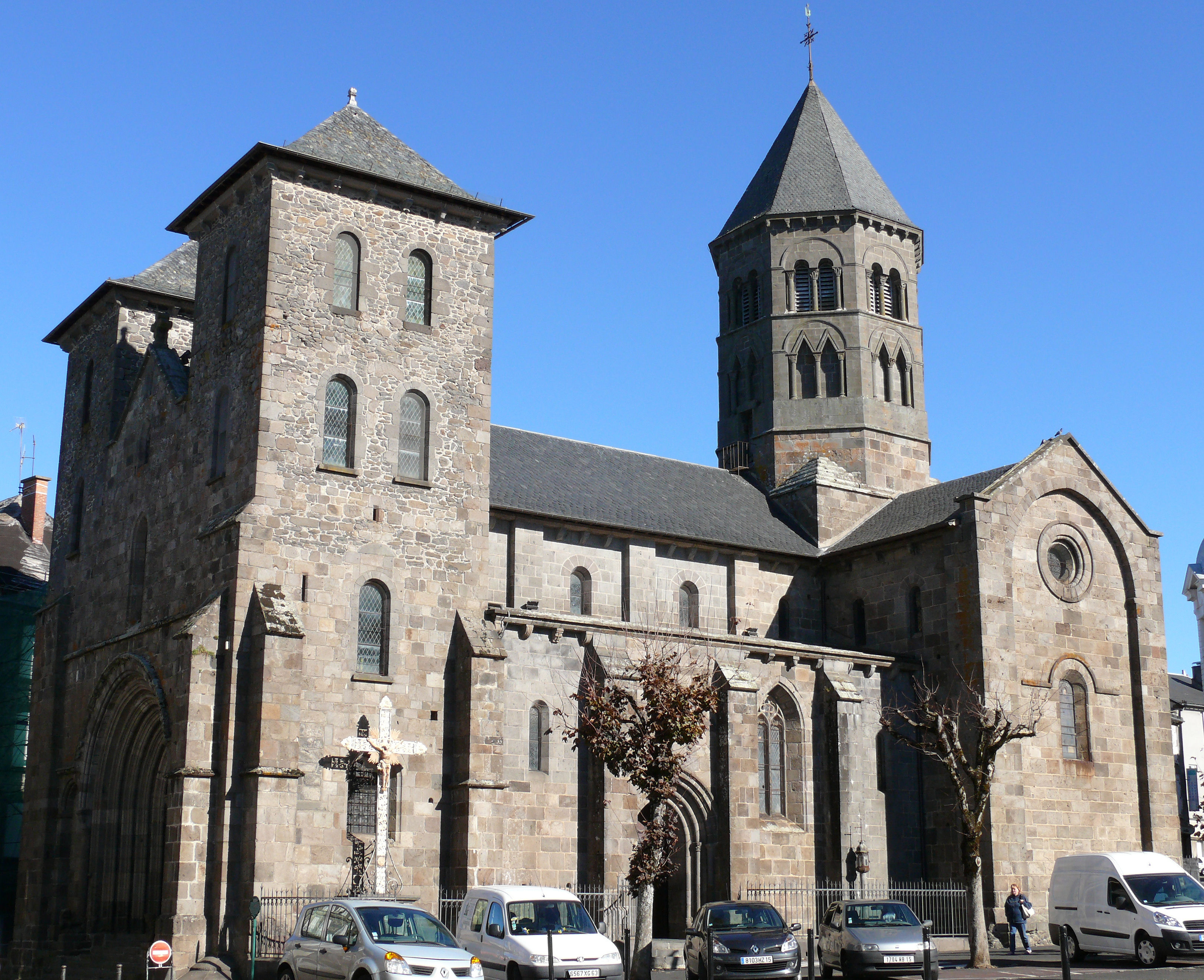 Mauriac - Basilique